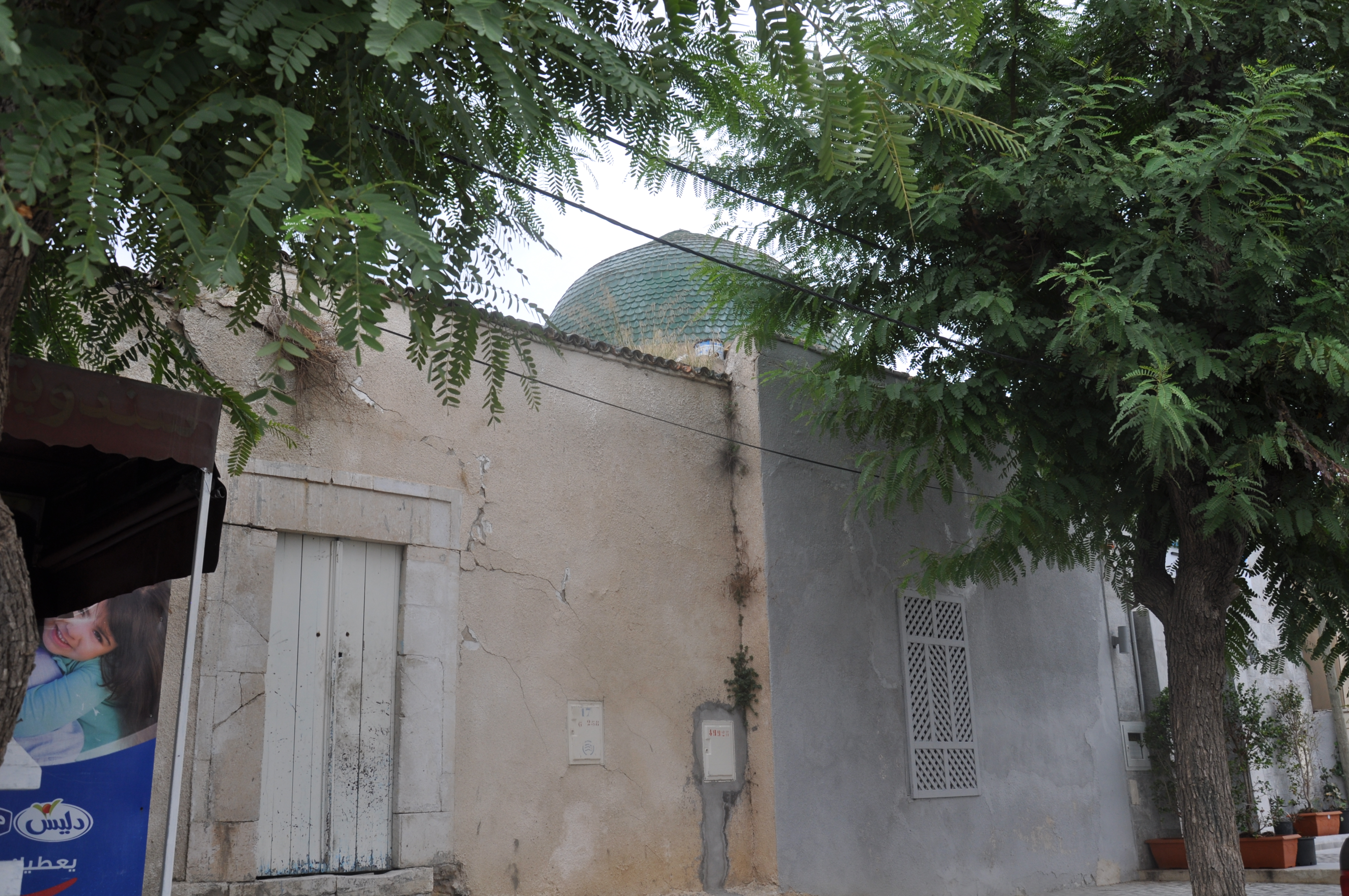 Zaouïa de Sidi Abdellah Chérif